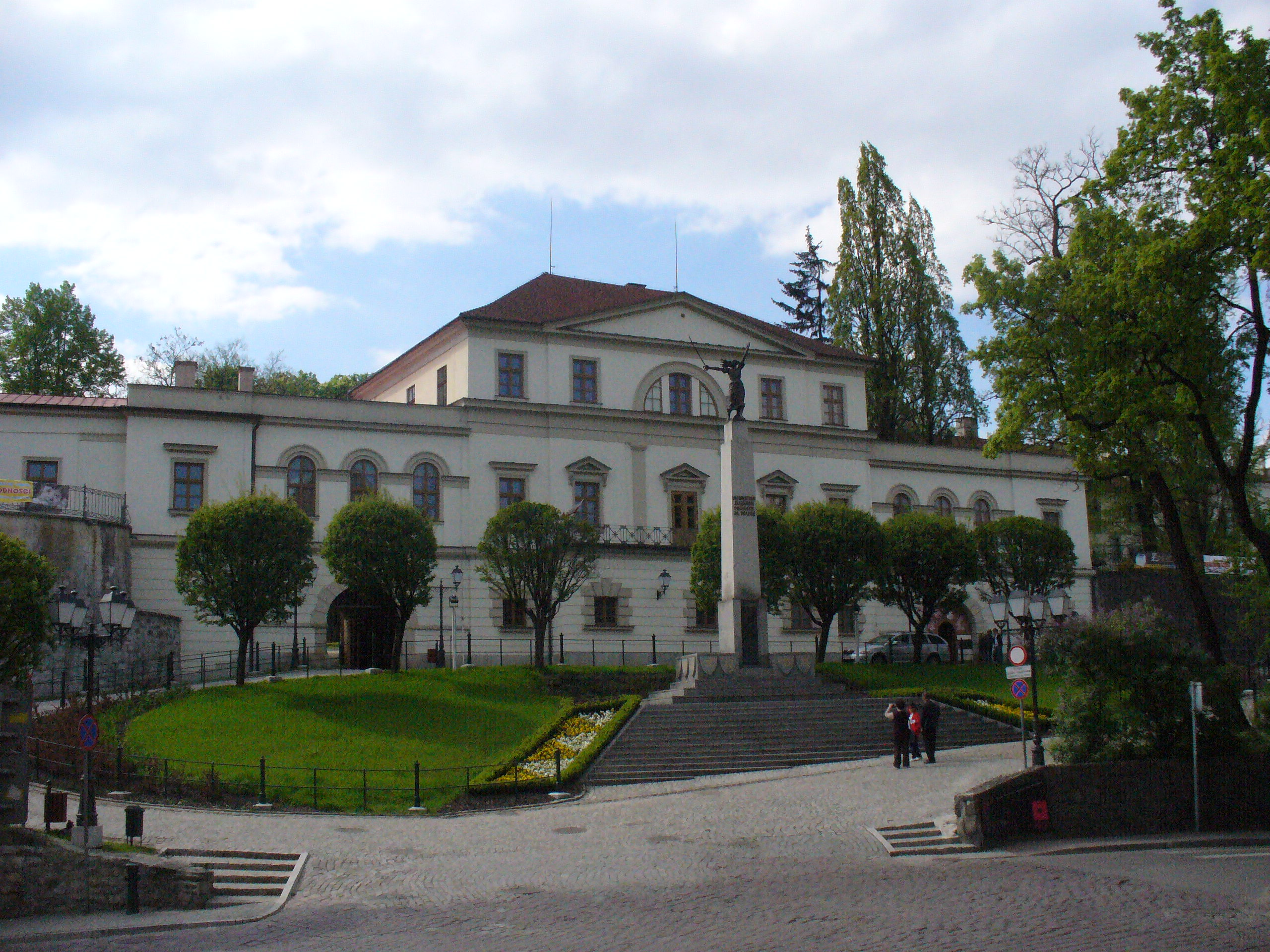 Pałac Habsburgów w Cieszynie.